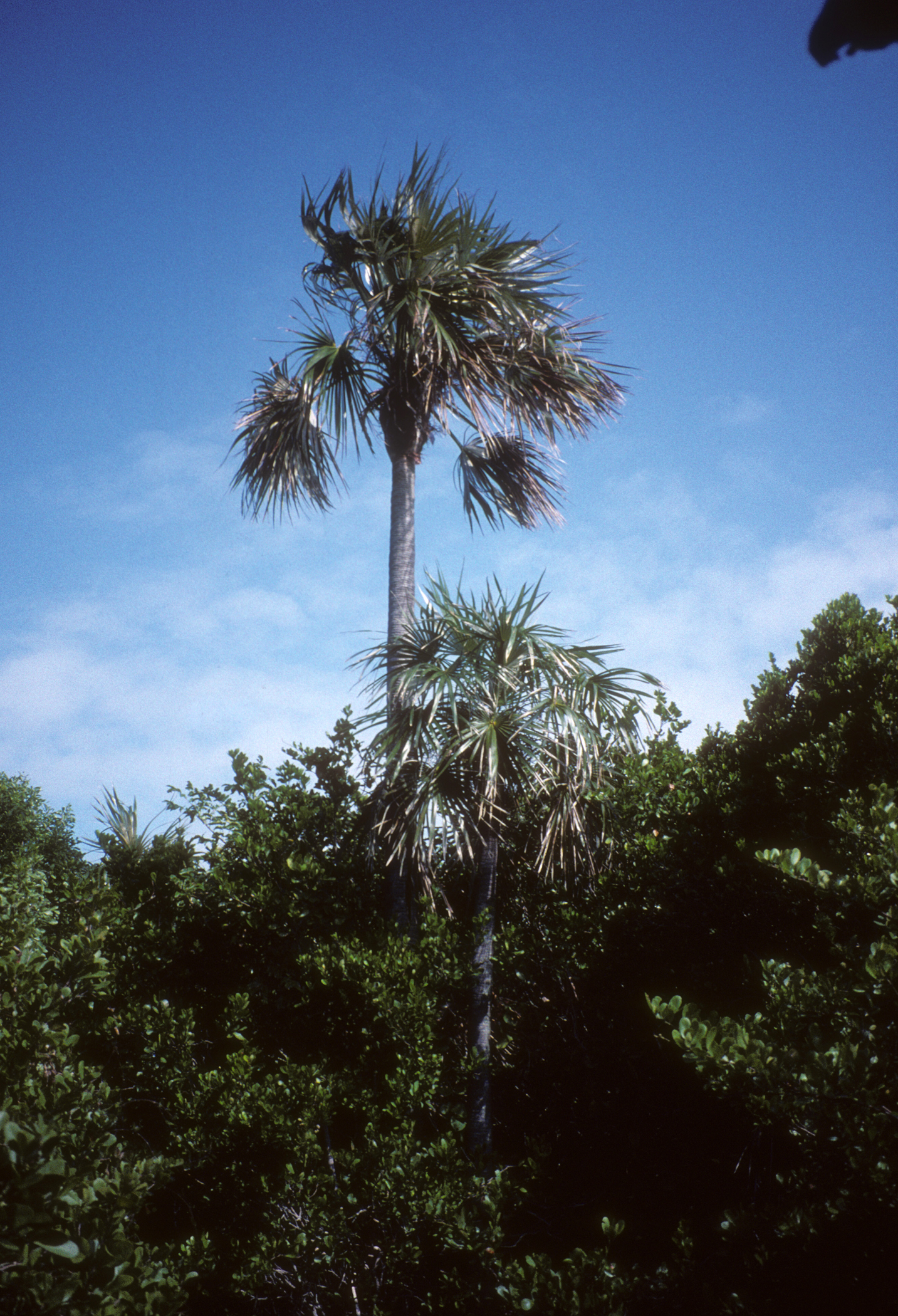 Bahia Honda, Monroe Co., Florida, USA. Jan 1996.